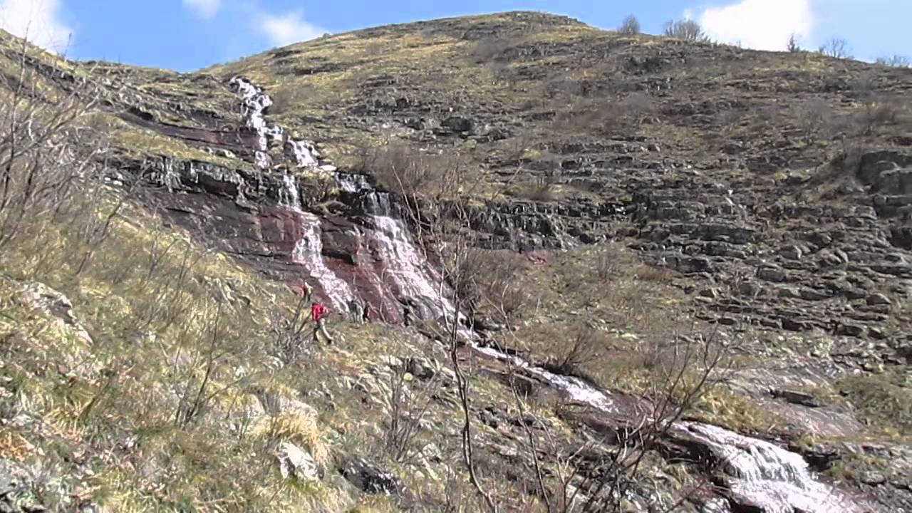 Српски (ћирилица): Калуђерски скок